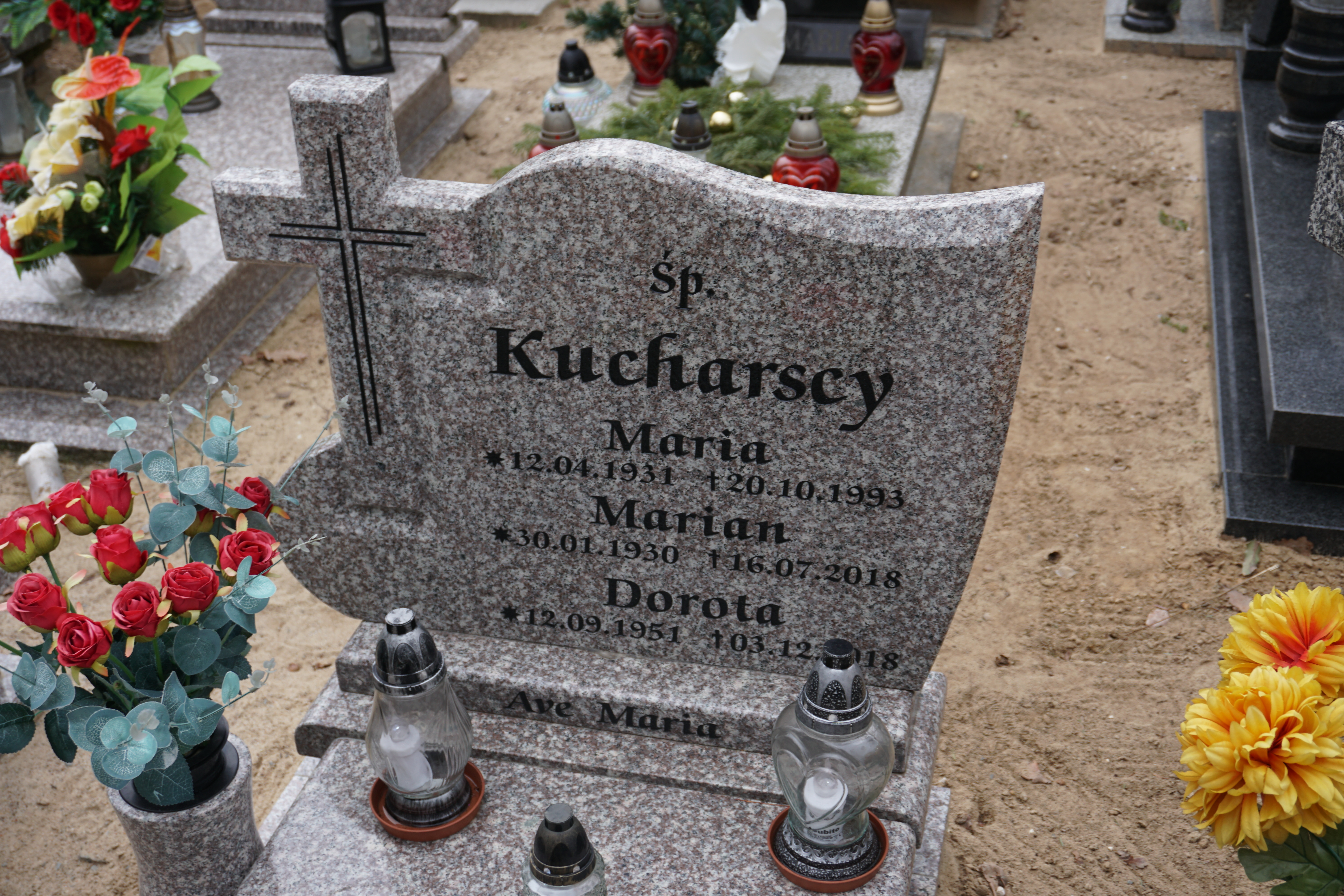 grób Mariana Kucharskiego na Cmentarzu Miłostowo w Poznaniu